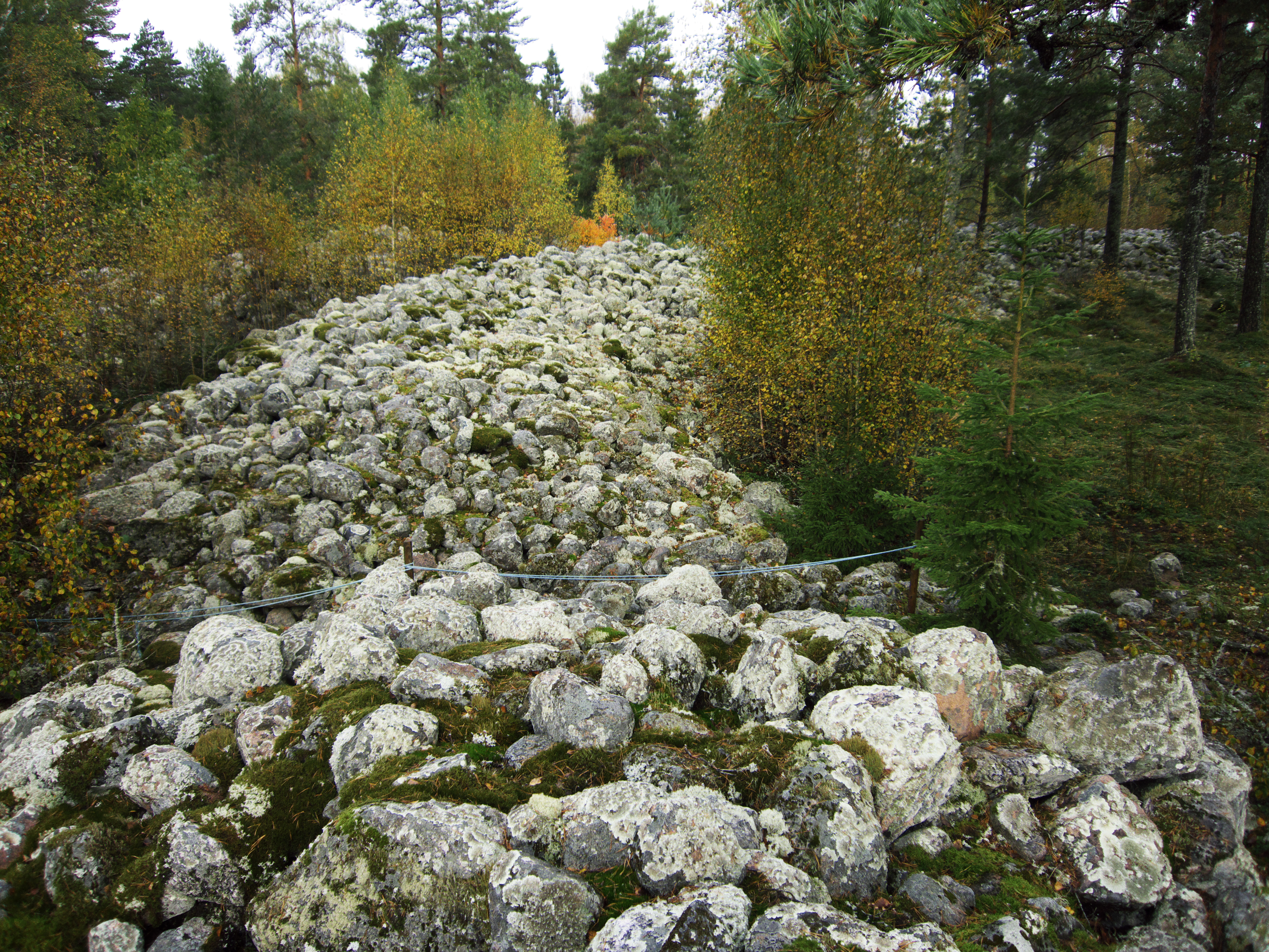 Visbergets fornborg, Häljeby, Munktorps socken. Del av inre muren.